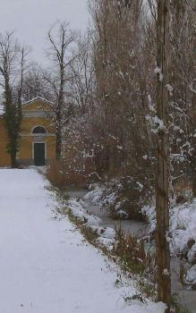 Giovanni Ceni. Convento dell'Annunciata di Medole. Chiesetta neoclassica del 1851